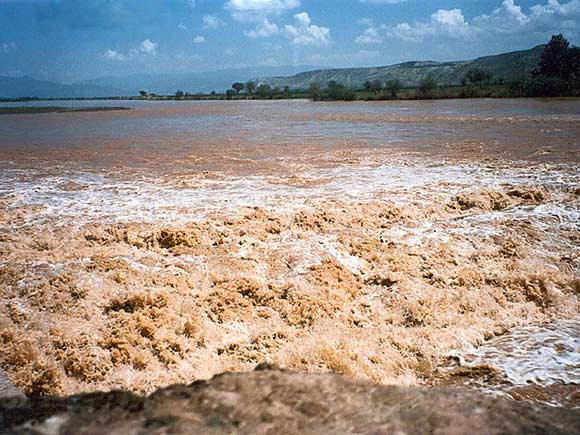 İskilip yaxınları Kızılırmak.